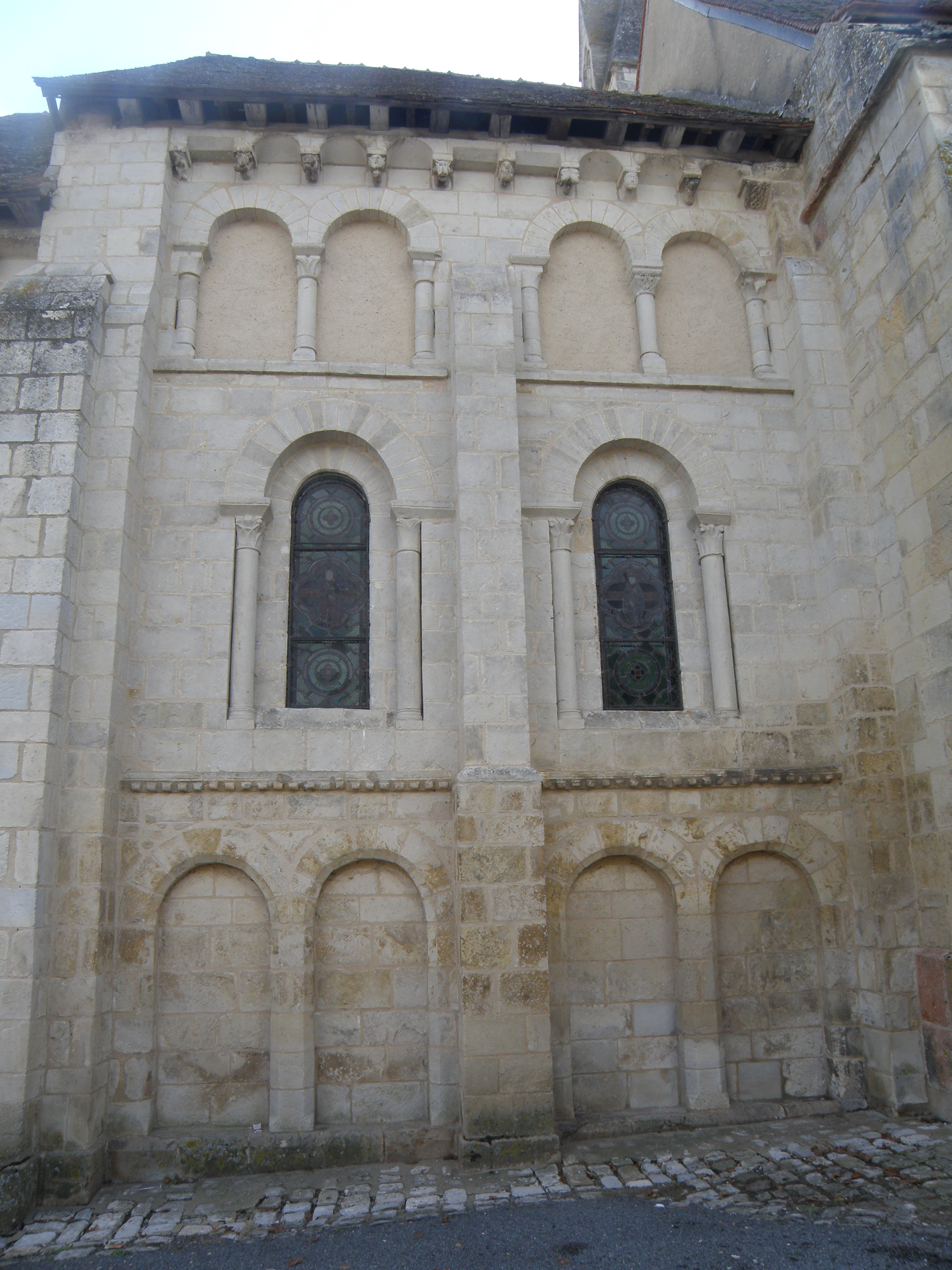 Église Saint-Éloi extérieur nord: arcades lombardes